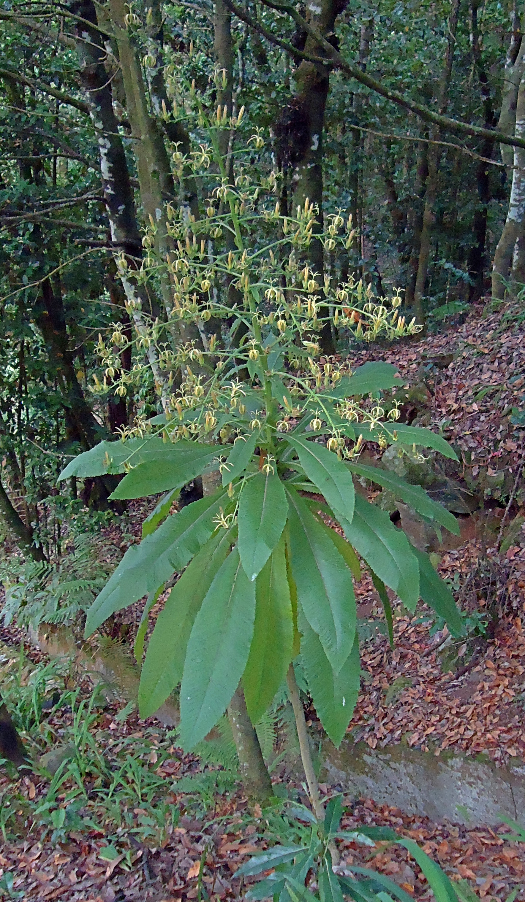 Musschia wollastonii in Ribeiro Frio, Madeira Island